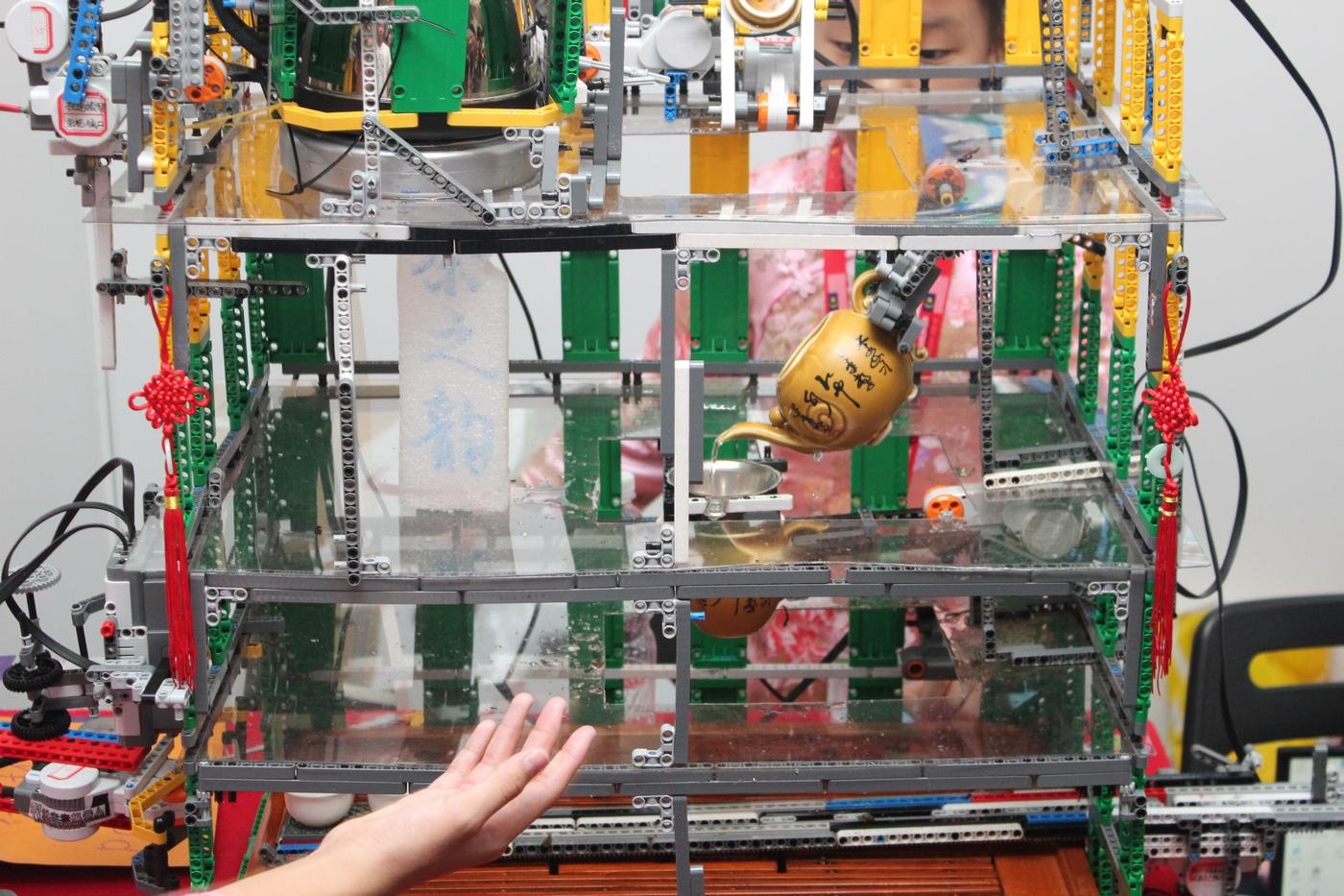 Beispiel der WRO 2012 in Malaysia, eine Teeeingießmaschine.